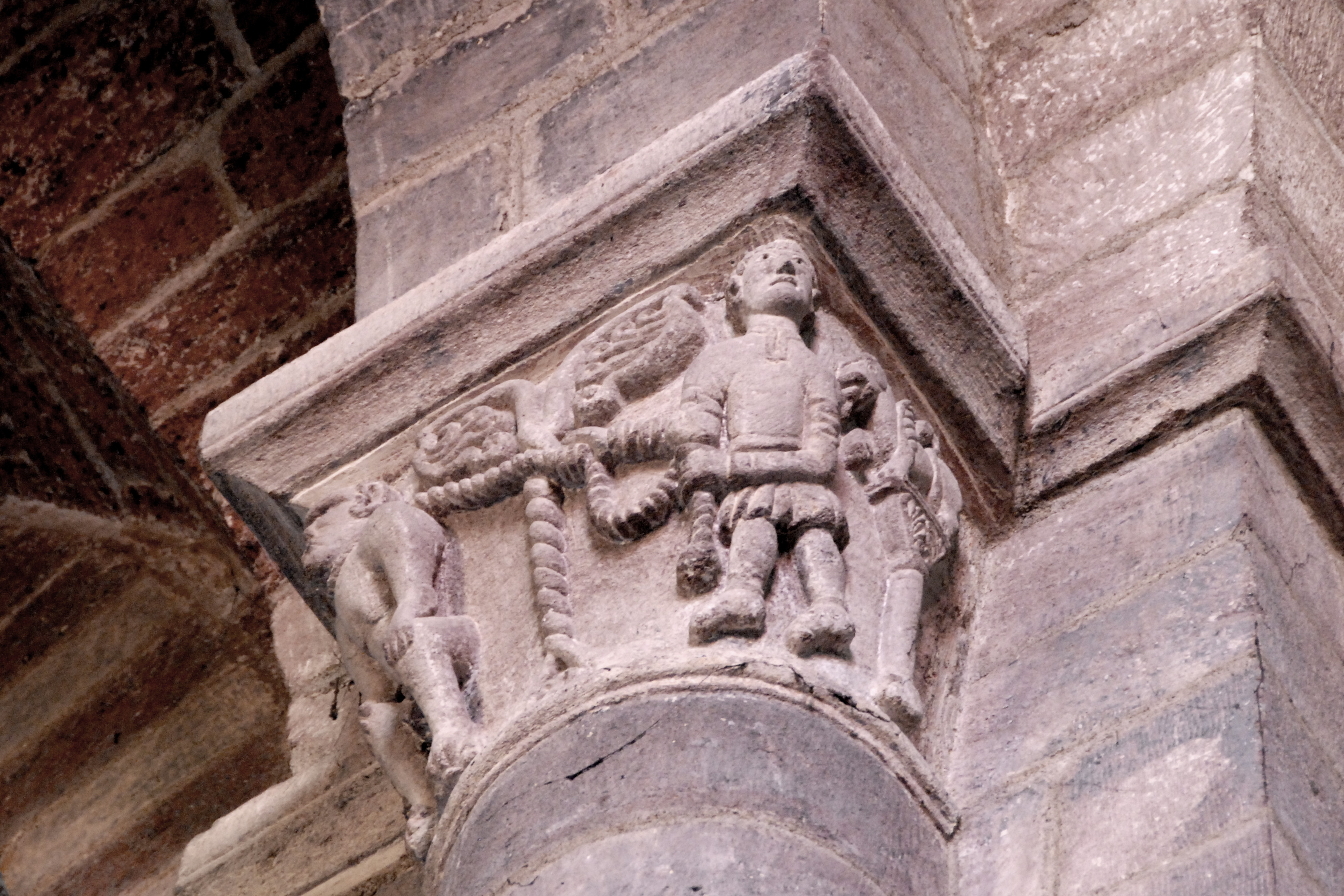 St.-Julien Brioude, Schausteller mit Affen